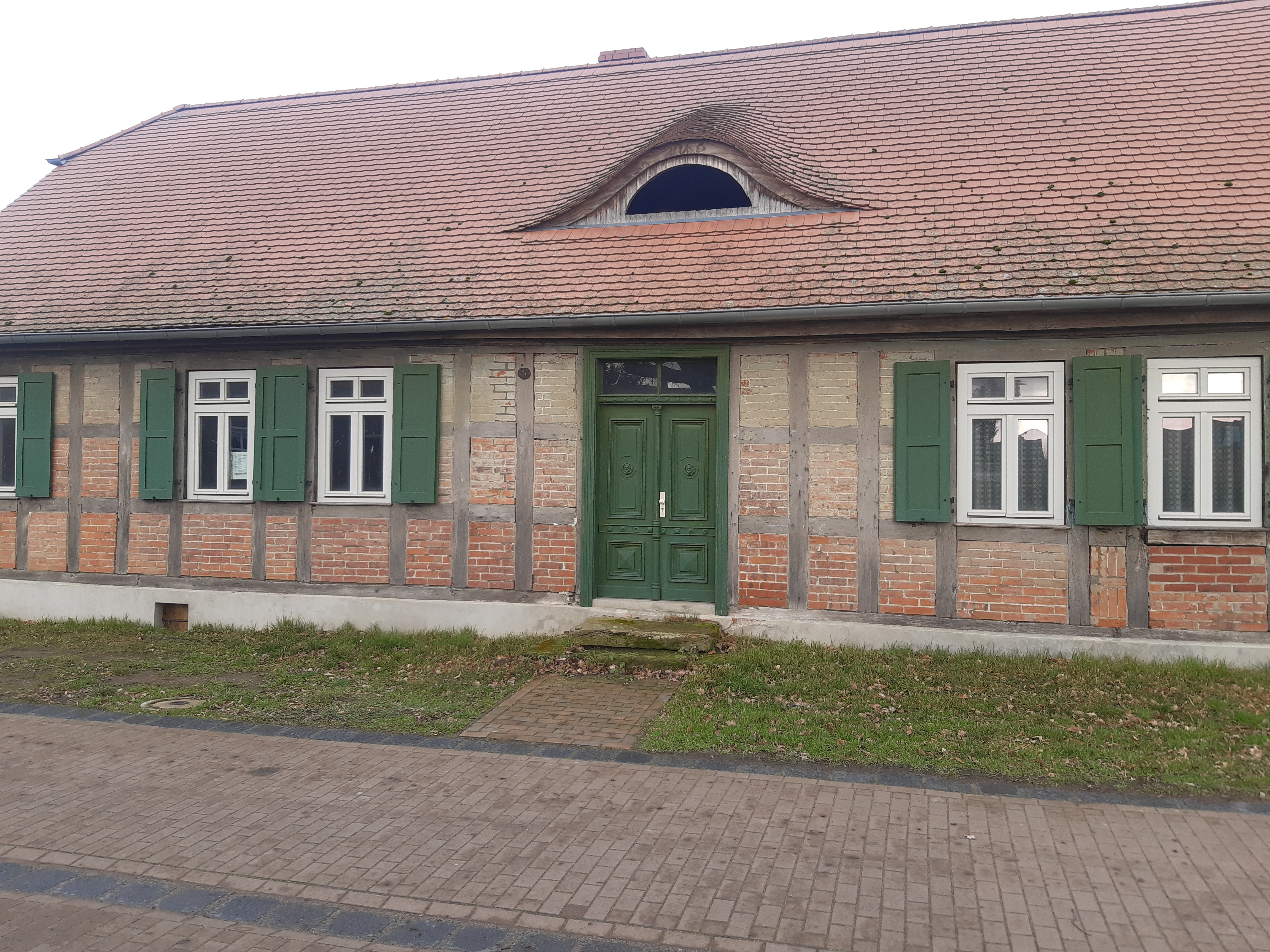 Bauernhof